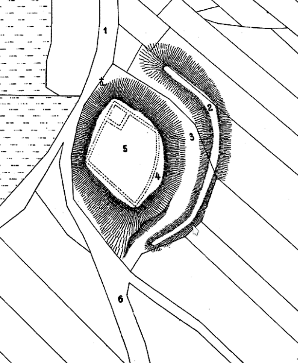 Kardašova Řečice – půdorys od Vojtěcha Krále z roku 1885; popis: 1 – cesta od Řečice, 2 – val, 3 – příkop, 4 – strana, kde stávala brána, 5 – hrad, 6 – cesta ke Zrádnému rybníku